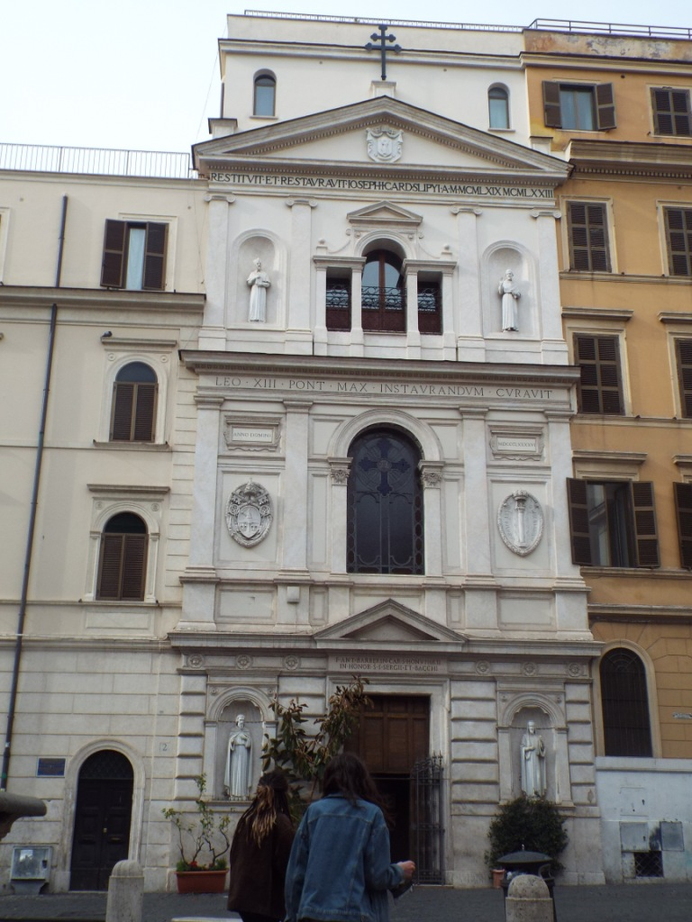 Церква св. мучеників Сергія та Вакха у Римі. Найстаріша греко-католицька церква за межами України. Фото 2018 р.